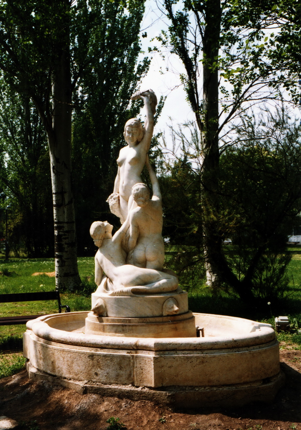 Vastagh Éva Balatoni sellők című szoborcsoportja a balatonfüredi Tagore sétányon, felállítva 1998-ban (első felavatására 1942-ben került sor)